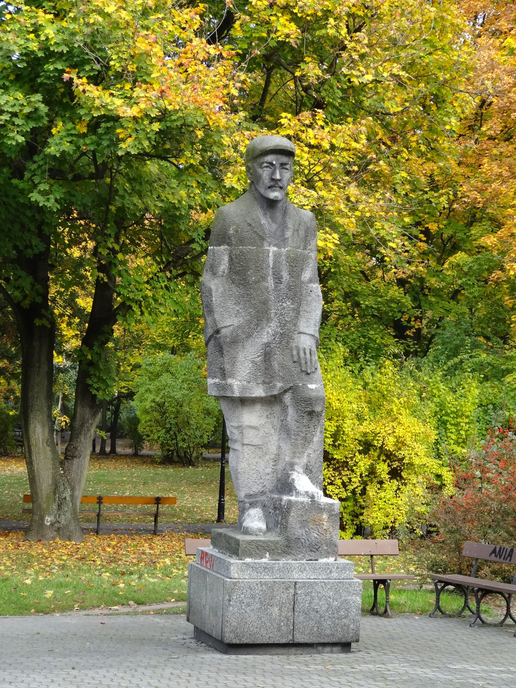 Posąg Mieczysława Karłowicza w parku im. Jana Kochanowskiego w pobliżu Filharmonii Pomorskiej